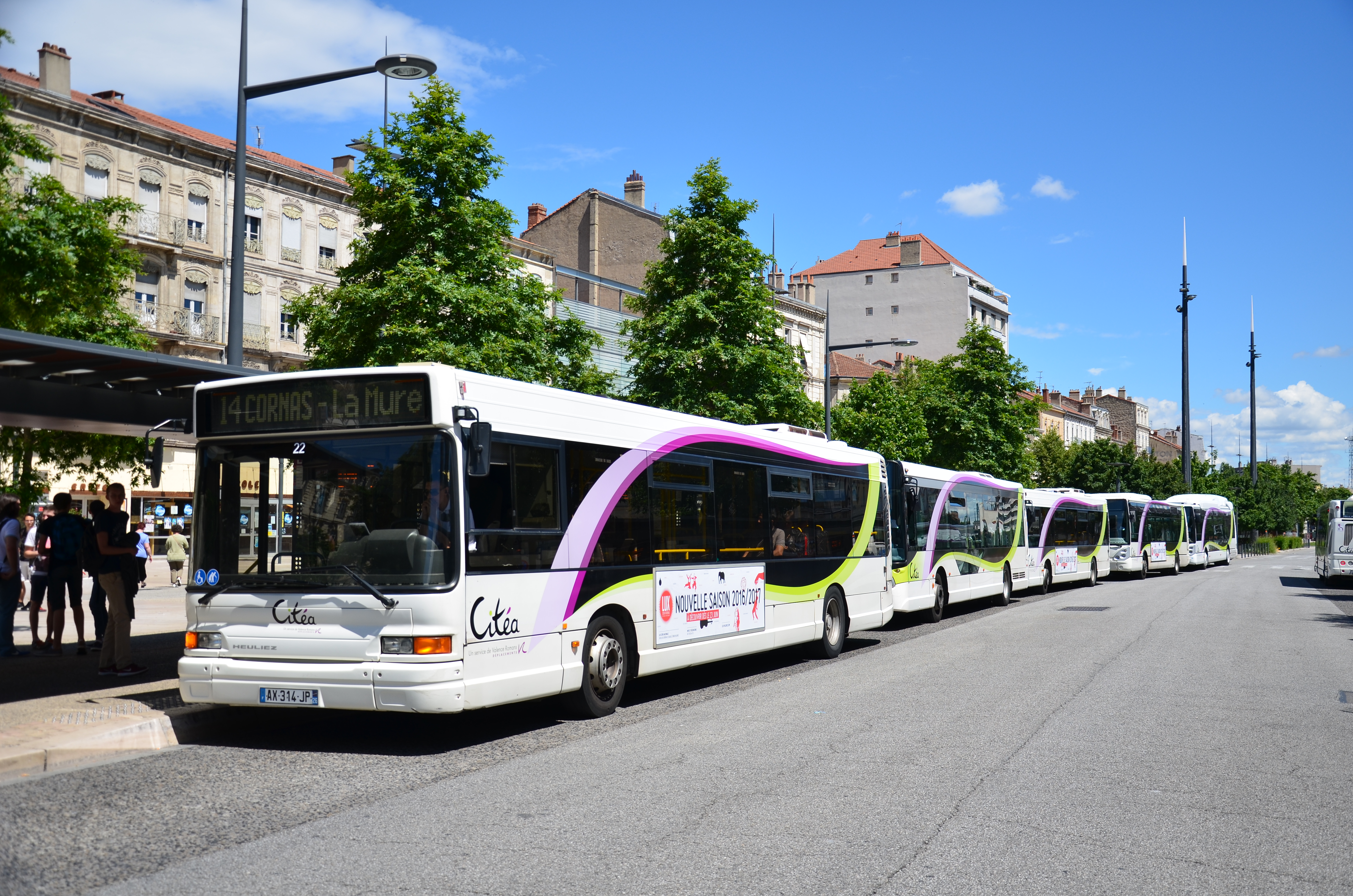 Nombreux véhicules en attente de départ au Pôle Bus de Valence (réseau Citéa), dont l'Heuliez GX 317 n°22.